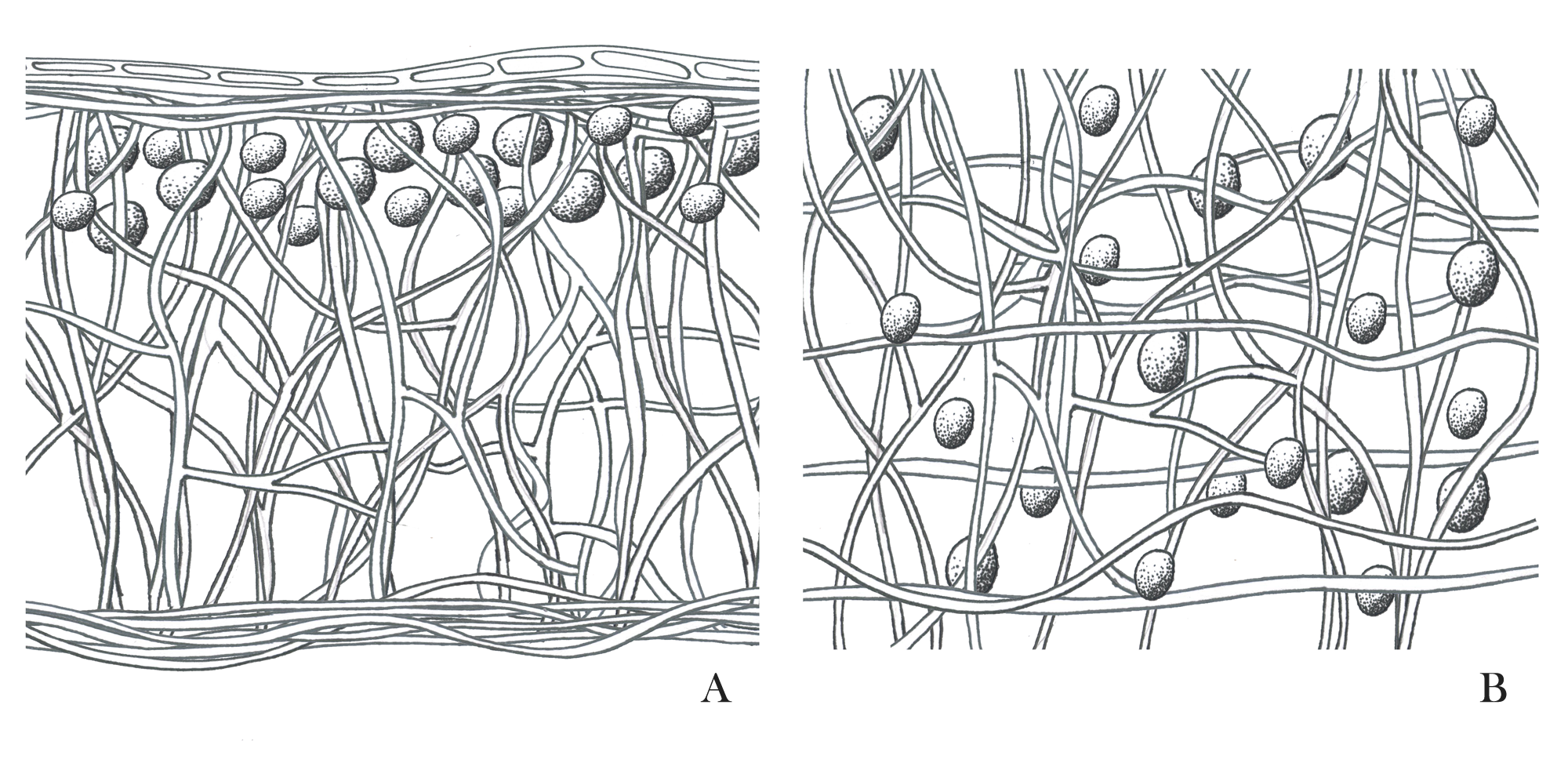 Imagen ilustrativa de la organización de los talos heterómeros y homómeros en líquenes. A. talo heterómero B. talo homómero